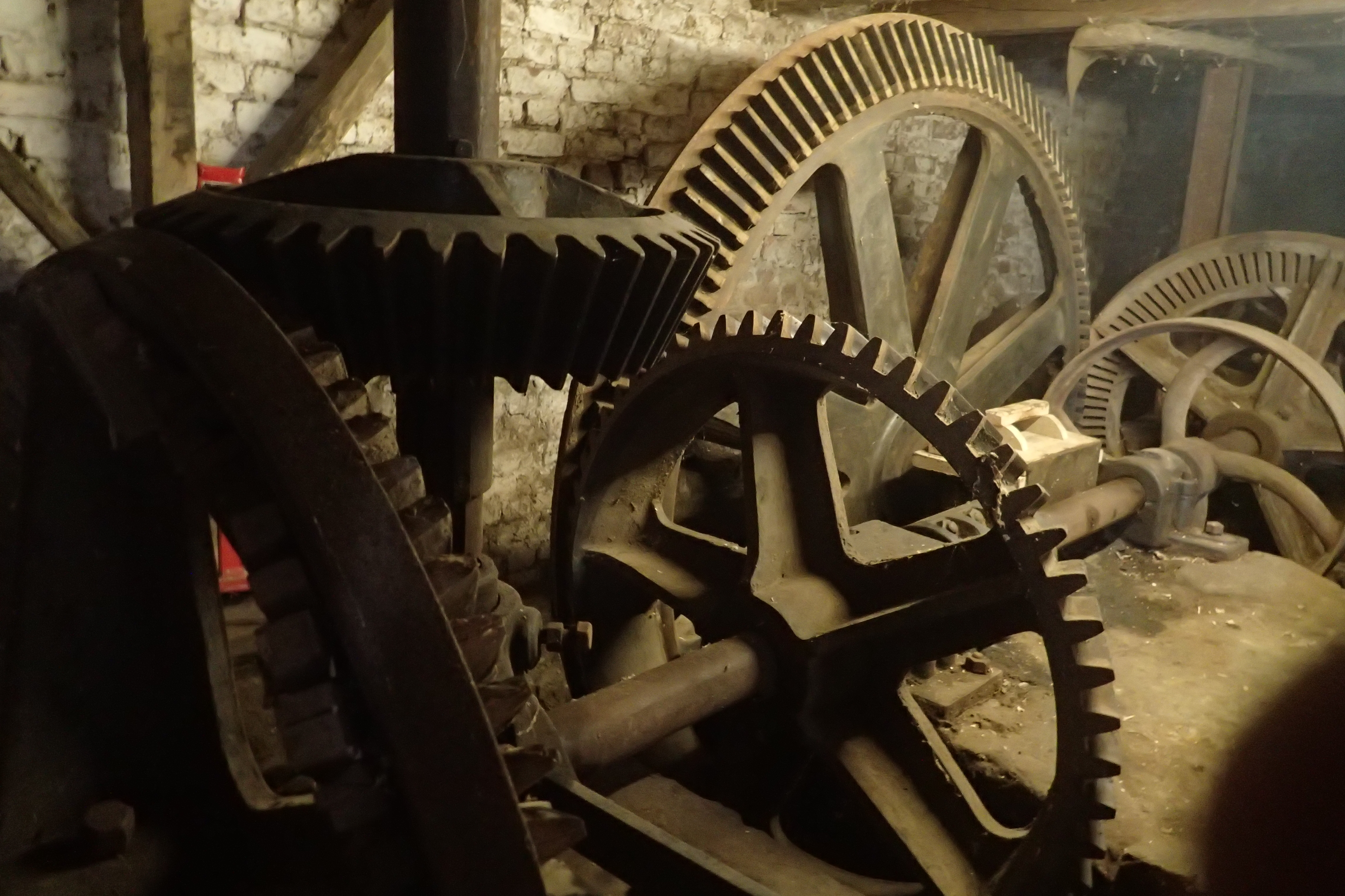 Deze oude watermolen (de huidige dateert van 1572) in Wambeek is aan restauratie toe, maar werkt nog steeds dankzij de goede zorgen van de eigenaar. Je kan hem op aanvraag bezoeken. This photo of immovable heritage has been taken in the Flemish Region